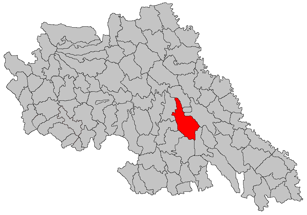 Categorie:Hărţi ale judeţului Iaşi